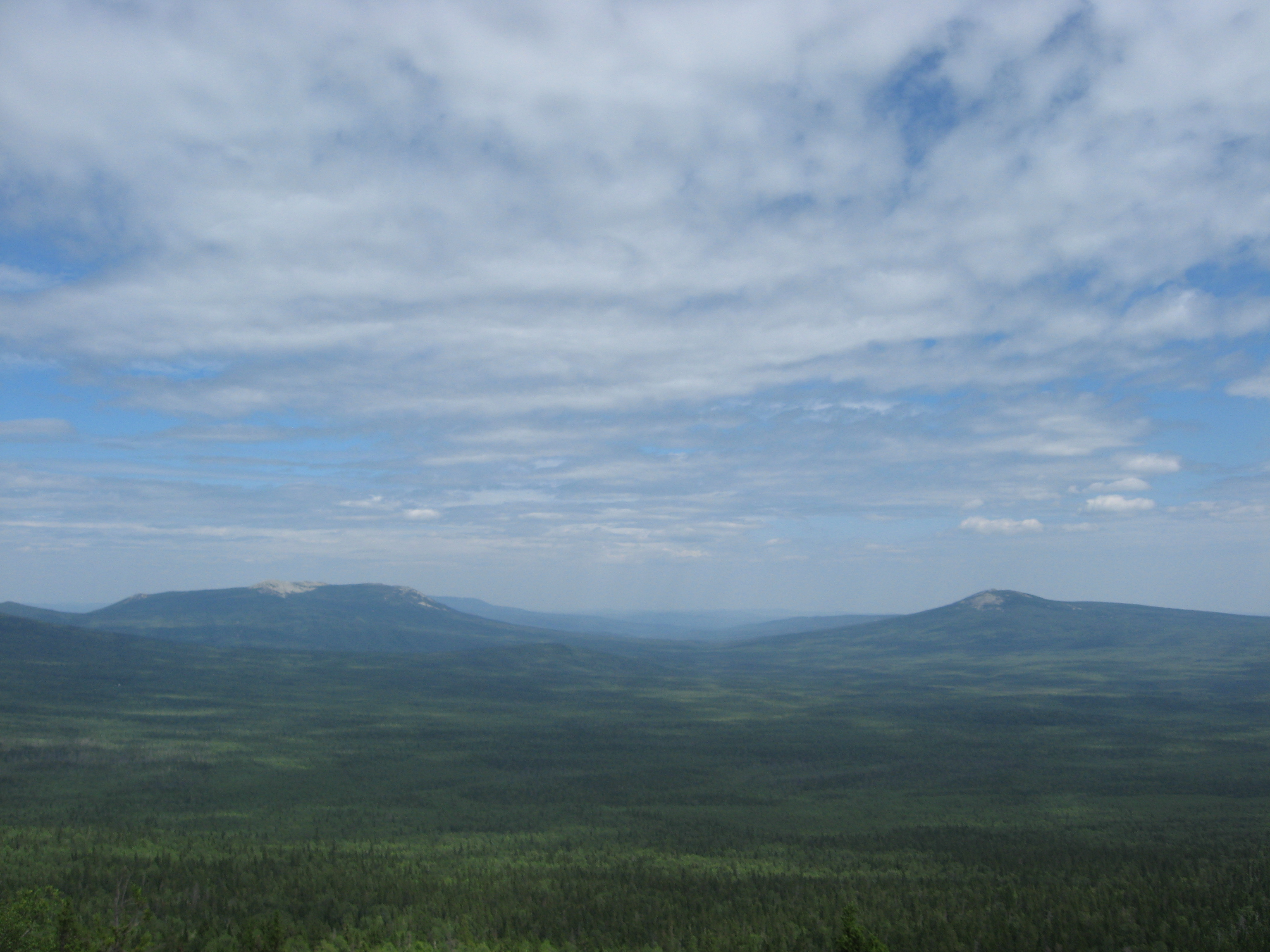 Таганайский природный комплекс, This image is related to the protected area of Russia number 7410002